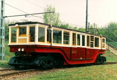 Millenniumi földalatti, Budapest